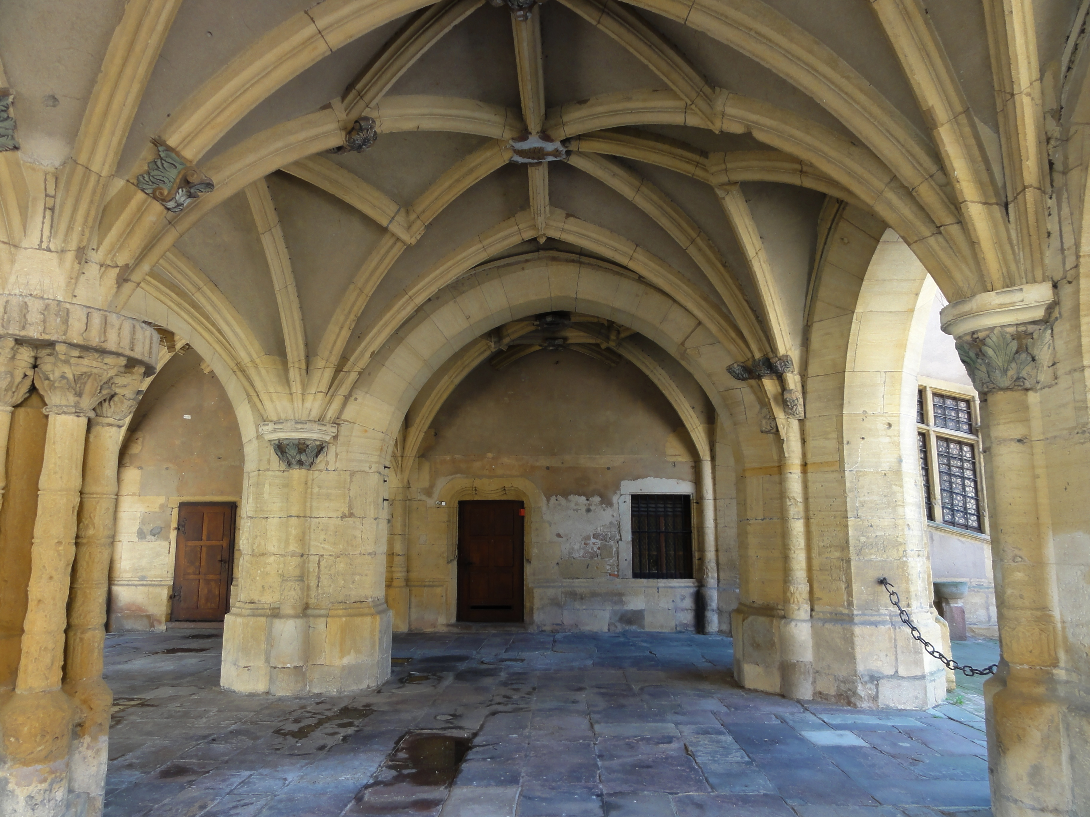 Alsace, Haut-Rhin, Ensisheim, Palais de la Régence Habsbourg (1535), rue de la Première-Armée-Française. It is indexed in the Base Mérimée, a database of architectural heritage maintained by the French Ministry of Culture, under the references PA00085421 and IA00074214.